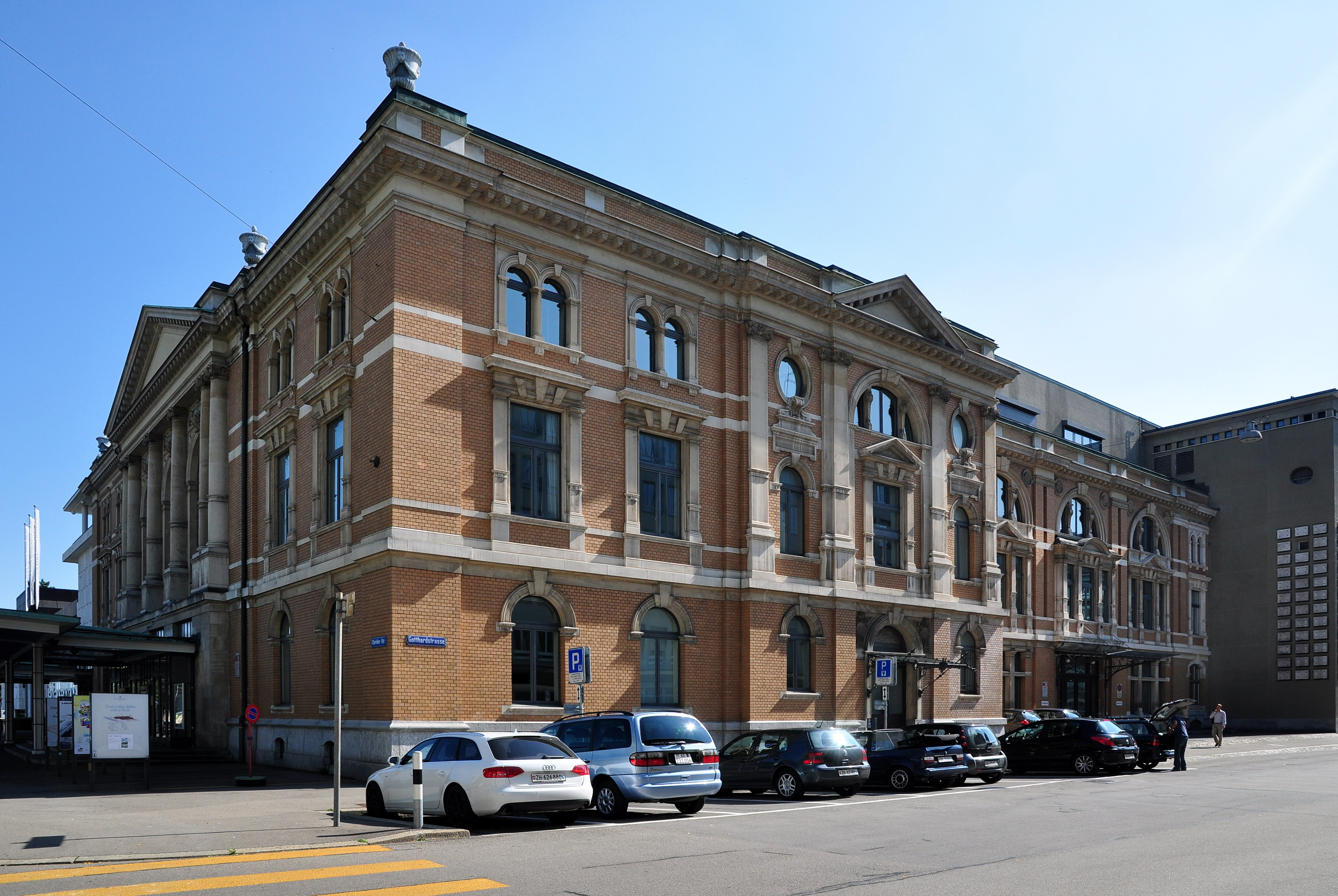 Kongresshaus-Kongresshaus in Zürich (Switzerland)